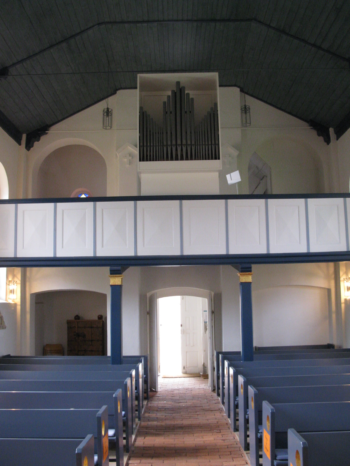 Die Orgel der Kirche Küsten vom Orgelbaumeister Alfred Führer